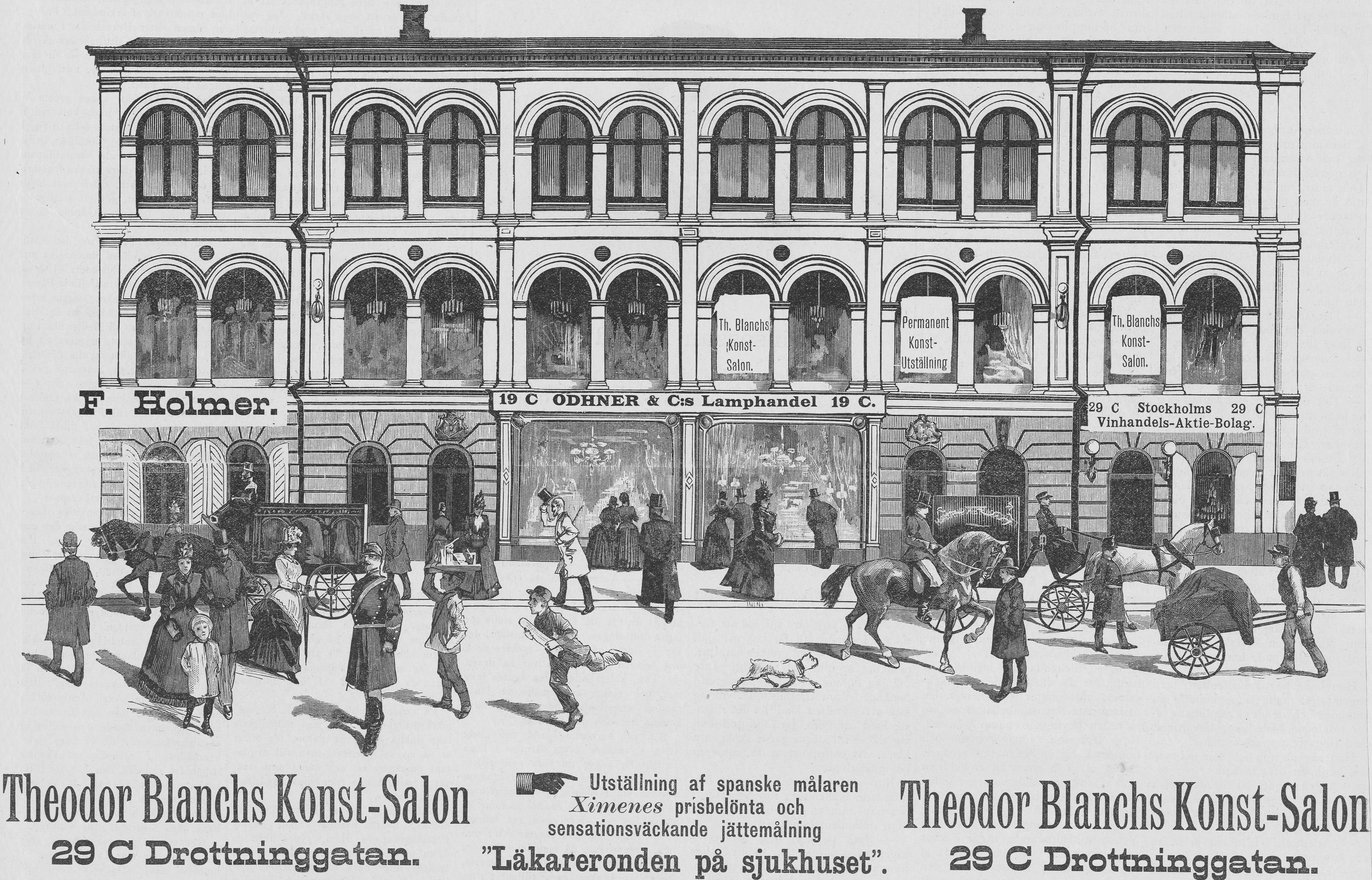 Drottninggatan 29, Theodor Blanchs Konst-Salong